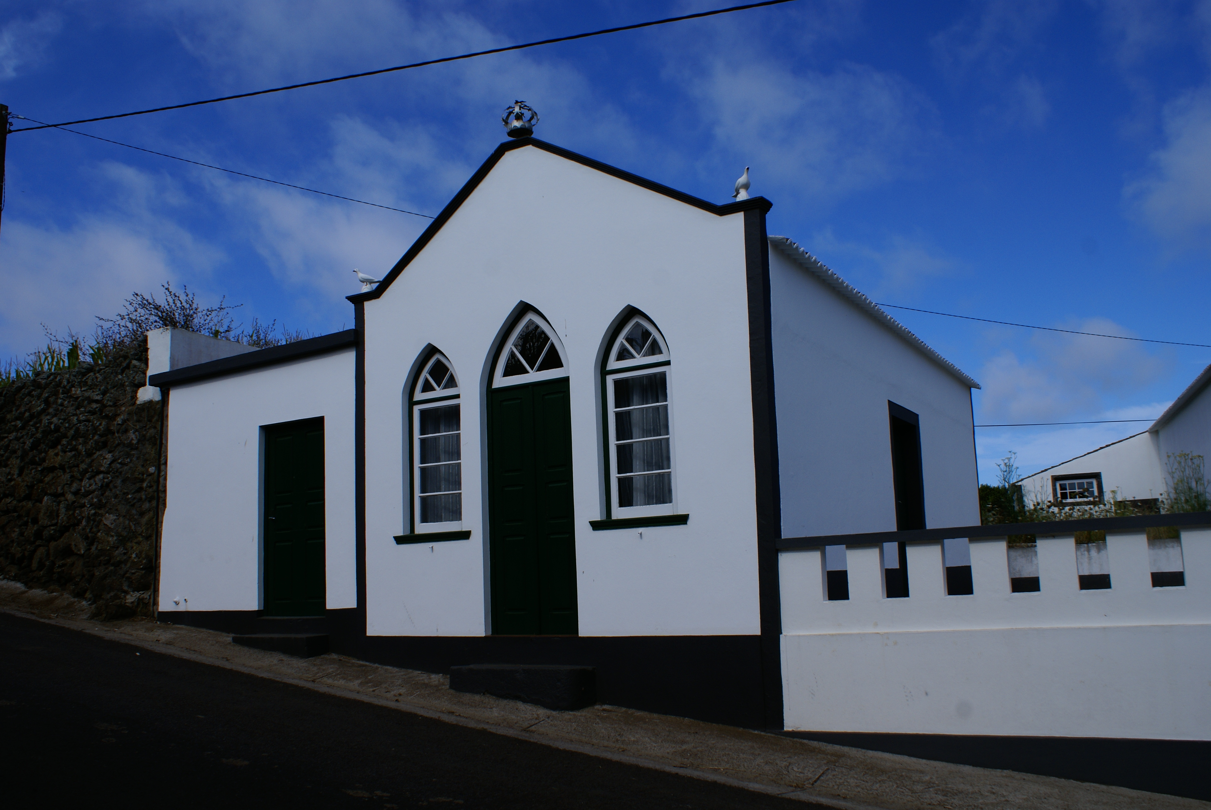 Império do Espírito Santo de Santo Amaro, Santa Cruz da Graciosa, ilha Graciosa, Açores, Portugal